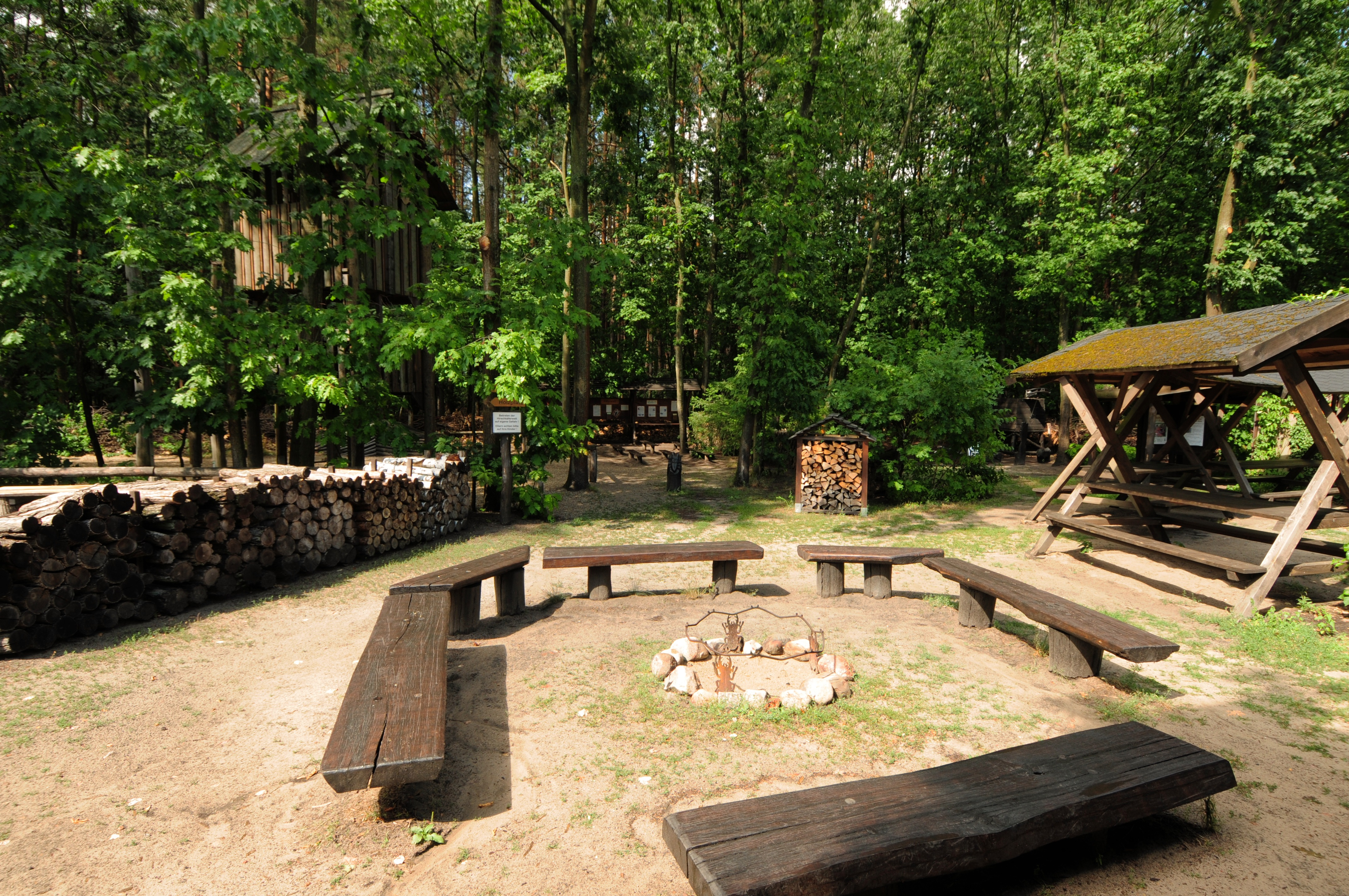 Gräbendorf: Haus des Waldes (Deutschland, Land Brandenburg)